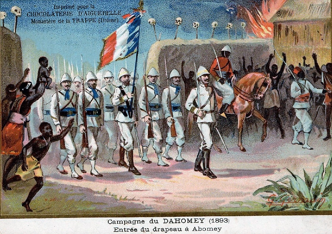 Carte postale - Campagne du Dahomey (1893) - Entrée du drapeau à Abomey